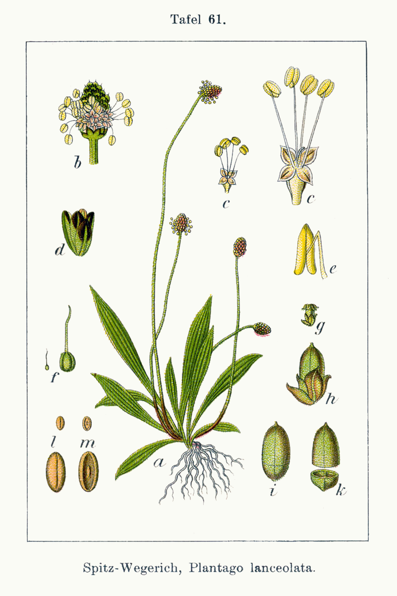 Plantago lanceolata L. Original Description Spitz-Wegerich, Plantago lanceolata